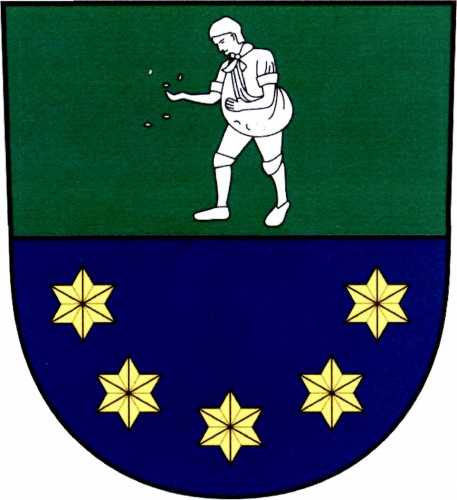 znak,Rešice , okres Znojmo